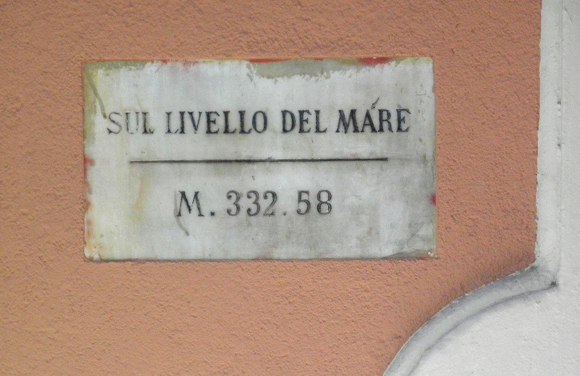 Stazione ferroviaria di Chiavenna, targa altimetrica.